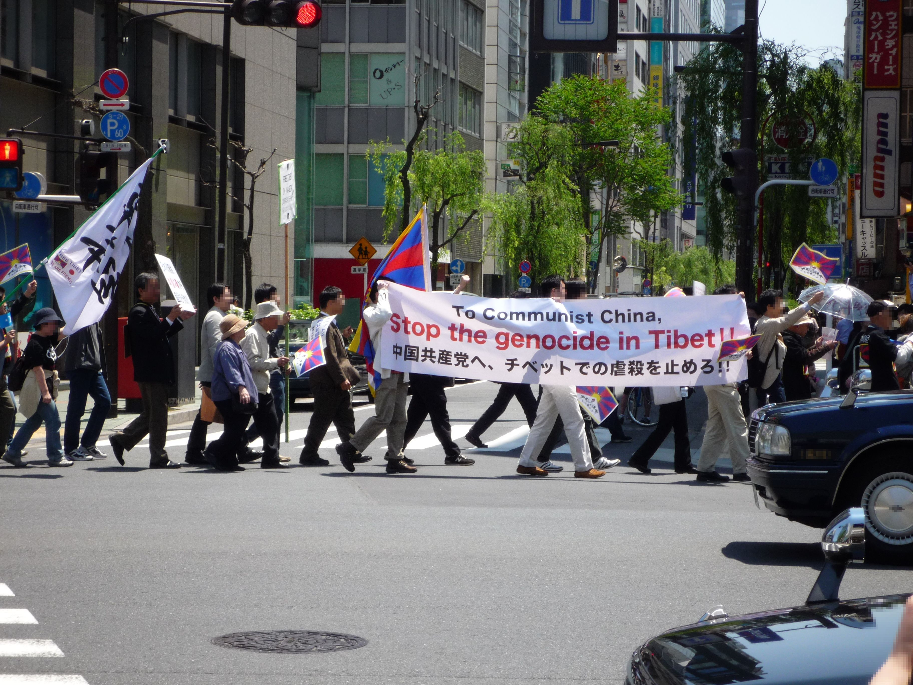 東京都中央区銀座で起こった暴動。チベット騒乱（2008年）。